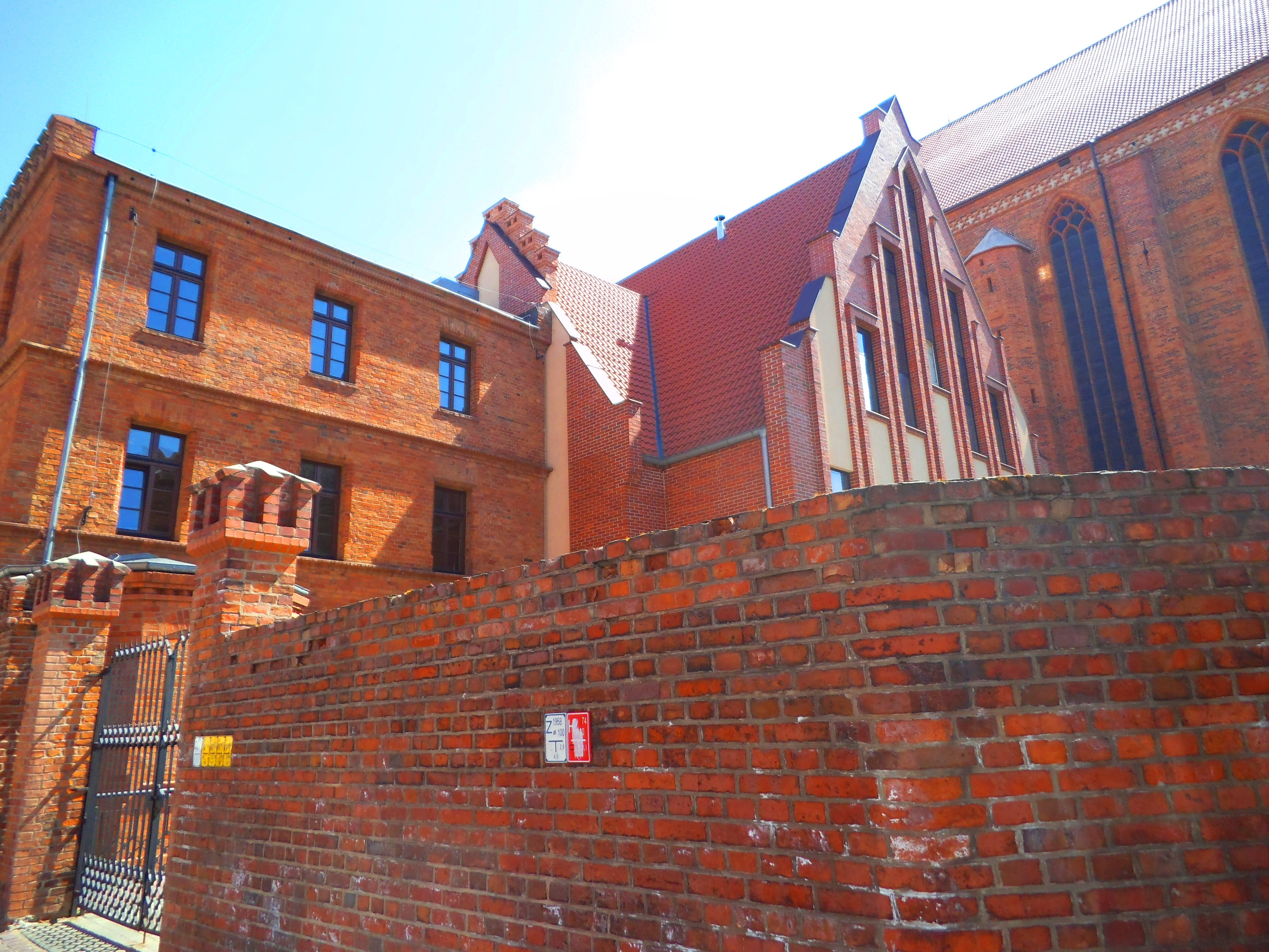 Orbitarium w Toruniu3